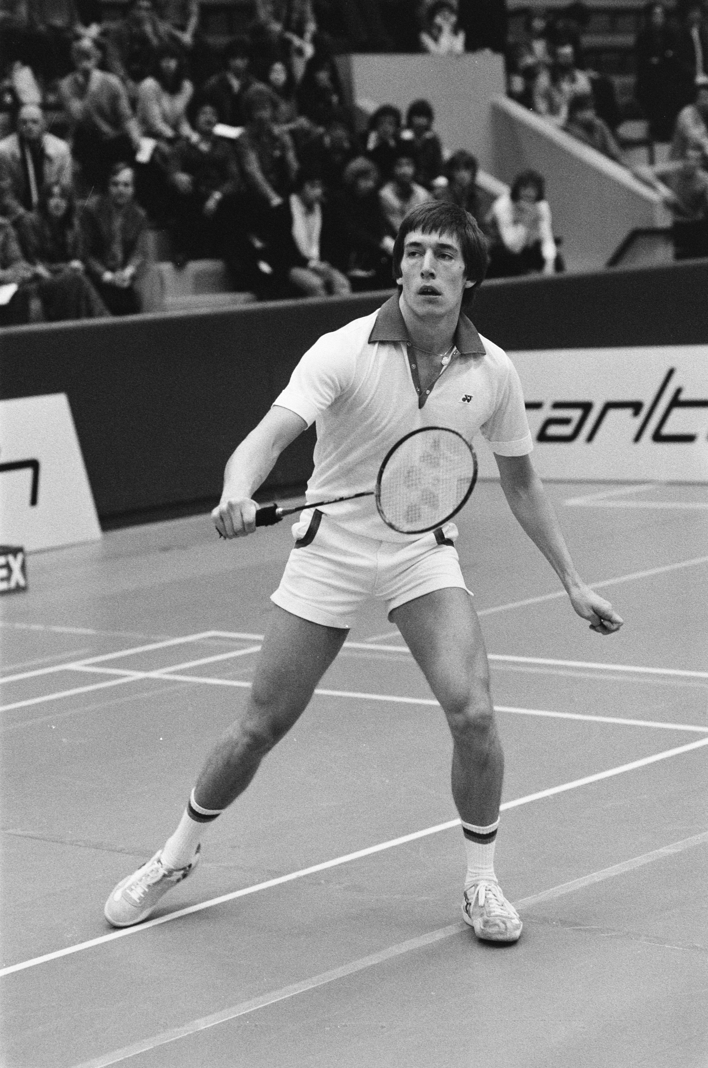 Collectie / Archief : Fotocollectie Anefo Reportage / Serie : Nationale Kampioenschappen Badminton te Utrecht Beschrijving : Rob Ridder in aktie Datum : 9 december 1979 Locatie : Utrecht (stad)/Utrecht (prov) Trefwoorden : badminton, sport, wedstrijden Persoonsnaam : Ridder, Rob Fotograaf : Pereira, Fernando / Anefo, [onbekend] Auteursrechthebbende : Nationaal Archief Materiaalsoort : Negatief (zwart/wit) Nummer archiefinventaris : bekijk toegang 2.24.01.05 Bestanddeelnummer : 930-5774